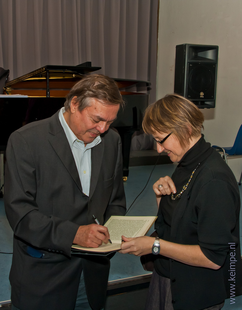 Drago Jancar